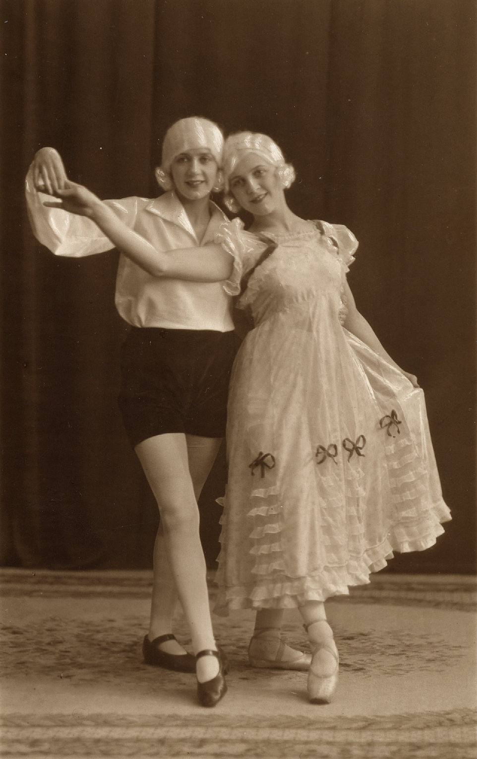 Format: Fotopositiv Dato / Date: Ukjent Fotograf / Photographer: Ukjent Sted / Place: Ilevollen 15, Trondheim Wikipedia: Hjorten Revy- og Varietéteater Wikipedia: Hans Lemvig Christiansen (1826 - 1879) Eier / Owner Institution: Trondheim byarkiv, The Municipal Archives of Trondheim Arkivreferanse / Archive reference: Tor.H45.P1.F9566 Merknad: Hjorten fikk navnet sitt i 1867, og var et kjent forlystelsessted. Fritz Topp kjøpte eiendommen i 1898, og da ble spesialbygniningen ombygd til den karakteristiske dragestilen som eldre trondhjemmere husker. Huset ble revet i 1962 for å gi plass til Ilevollen menighetshus og sykehjem.